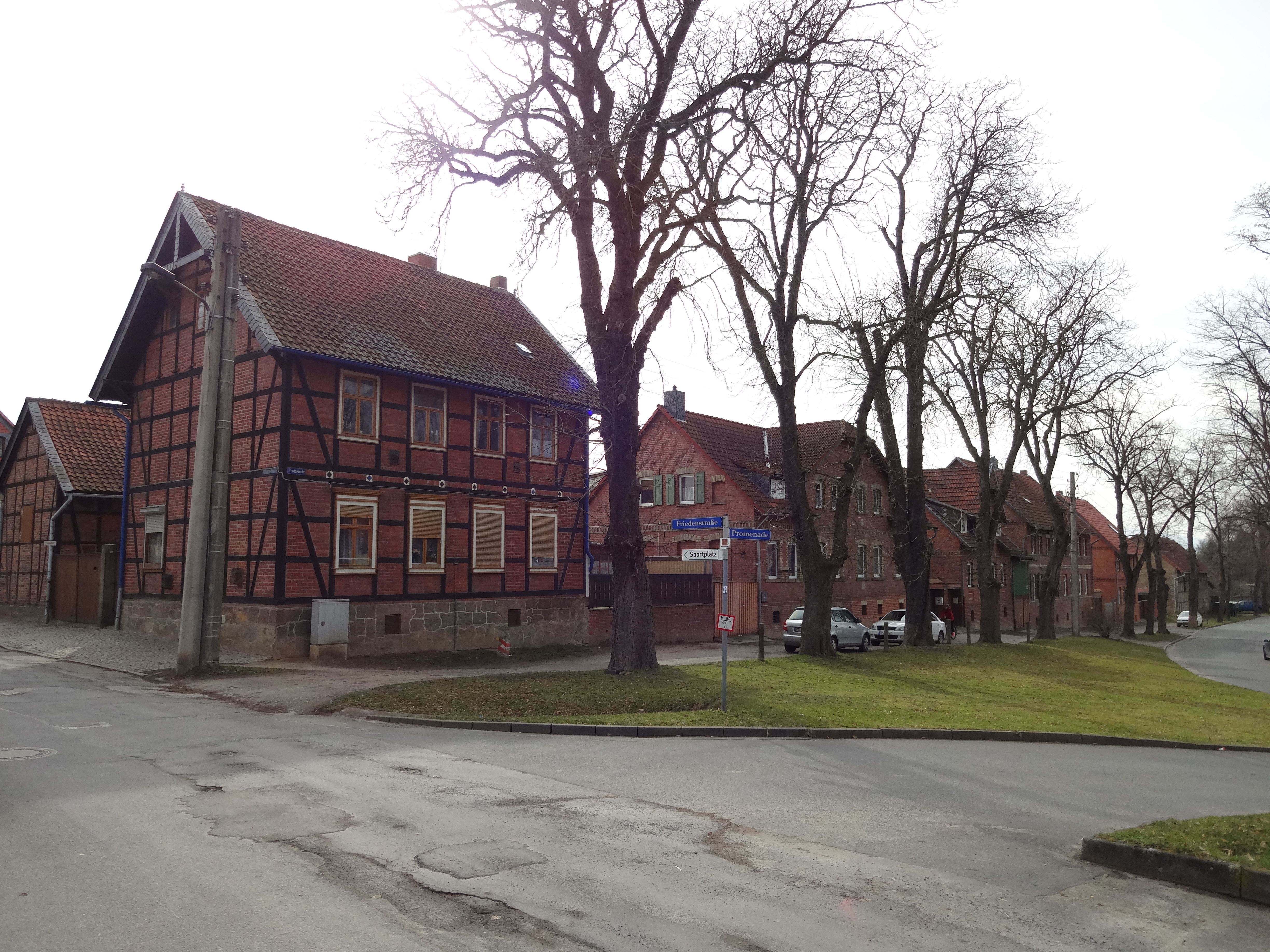 Fachwerkhaus in der Friedensstraße (Teil einer denkmalgeschützten Friedensstraße 6, 12, Promenade 18, 20, 22, 24, 26, 28, 30) in Derenburg, Ortsteil von Blankenburg (Harz)